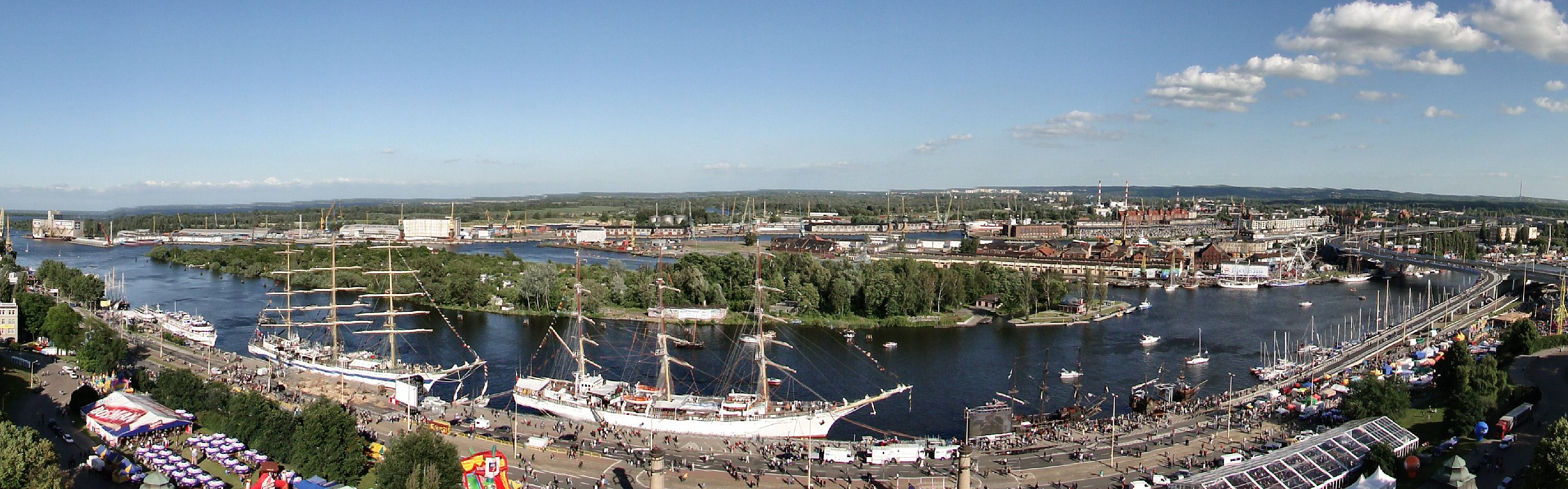 Panorama Portu w Szczecinie wykonana z punktu widokowego na szczycie Muzeum Morskiego